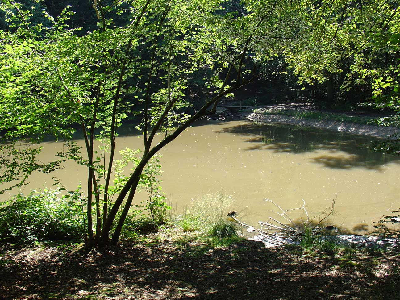 Ravensbos (Limburg)